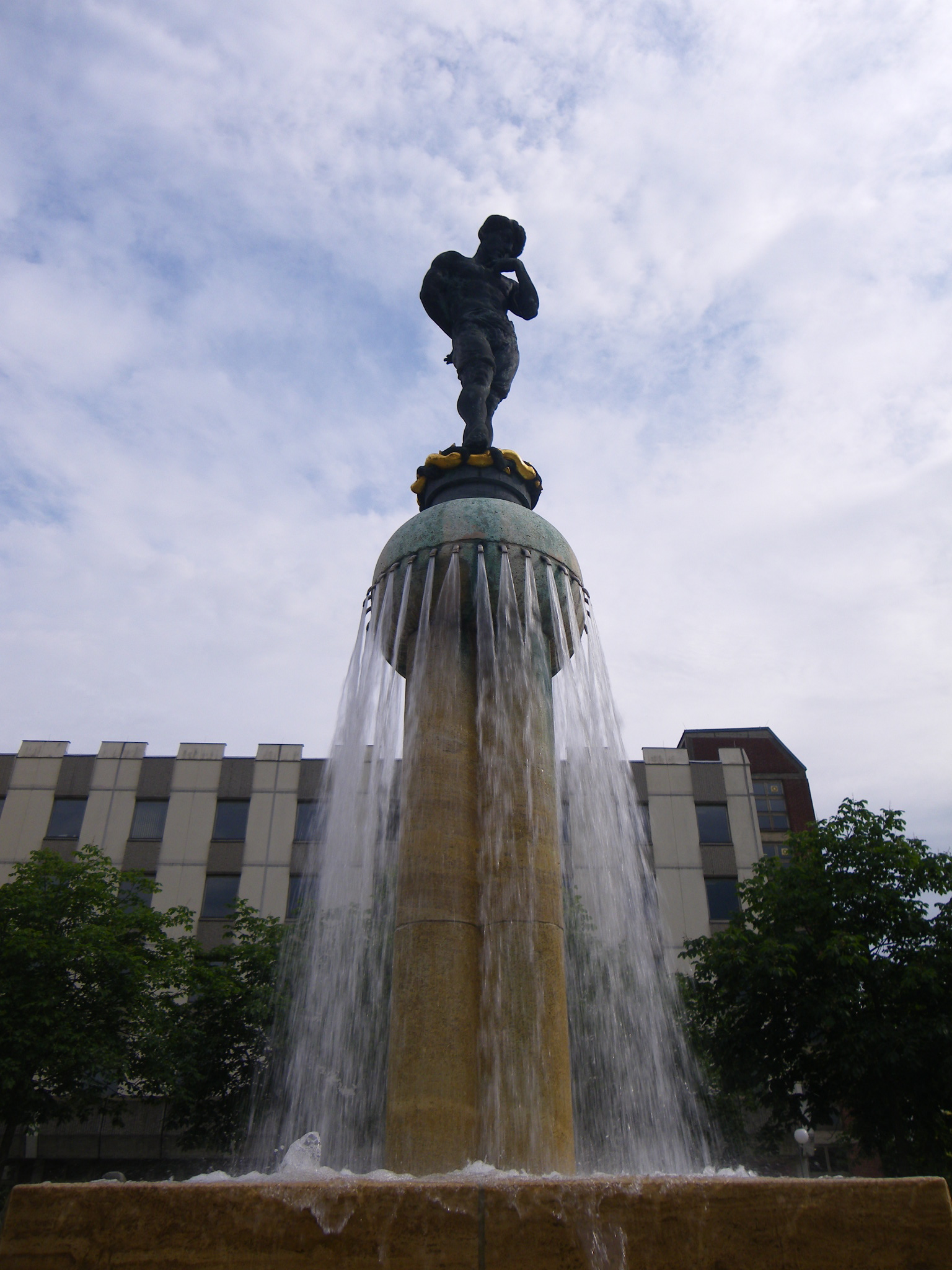 Bernd Göbel (*1942), Hodscha Nasreddin, 1980/2001, Bronze, teilvergoldet Neustädter Passage 15